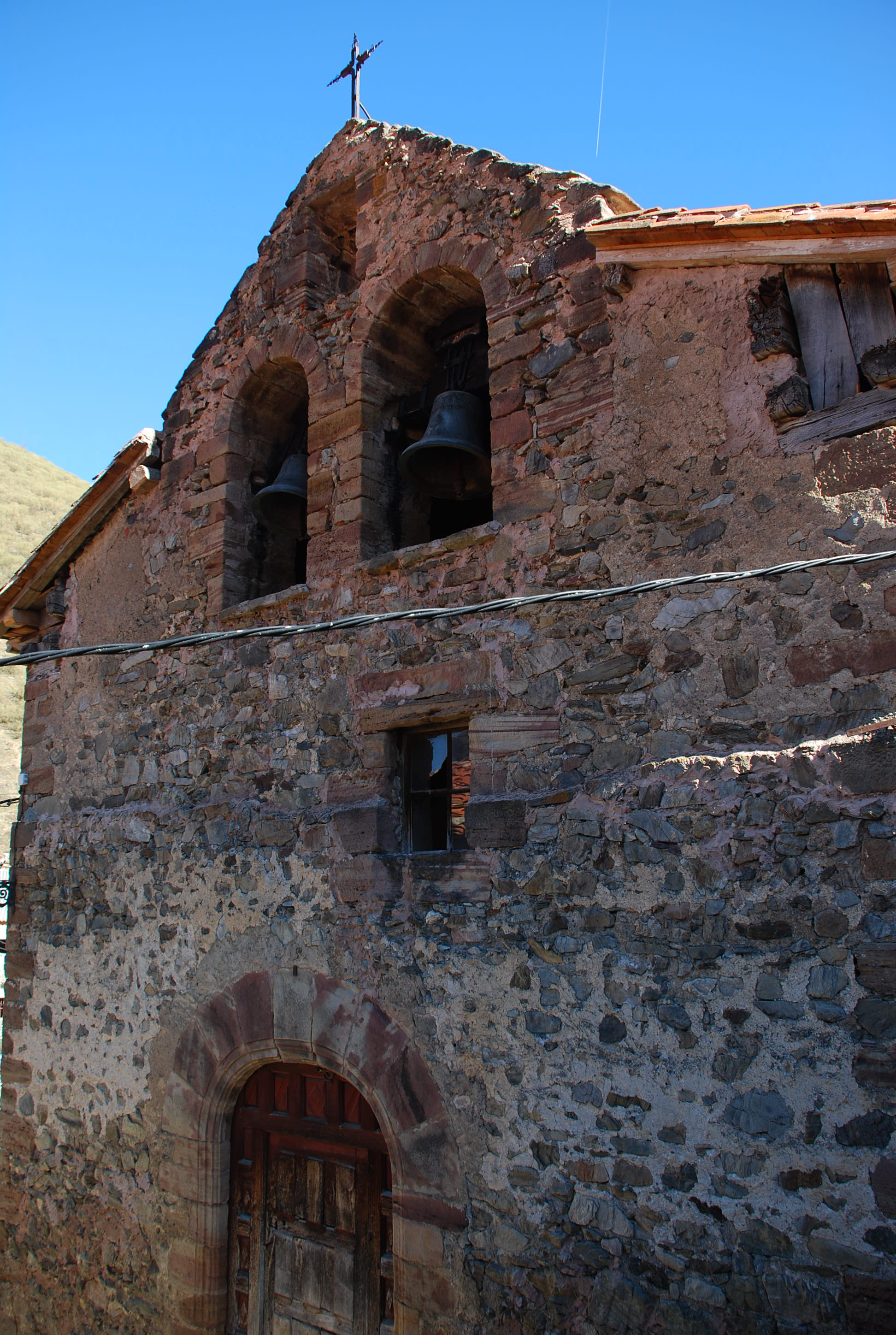 Iglesia de la Ascensión en Urdanta, aldea de Ezcaray (La Rioja - España).